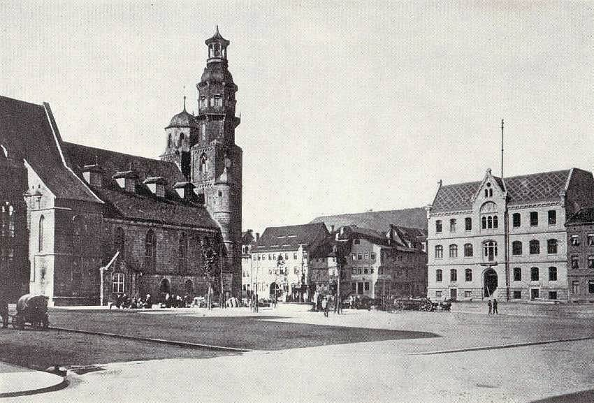 Stadtkirche in Meiningen und Rathaus (rechts) im Jahr 1876